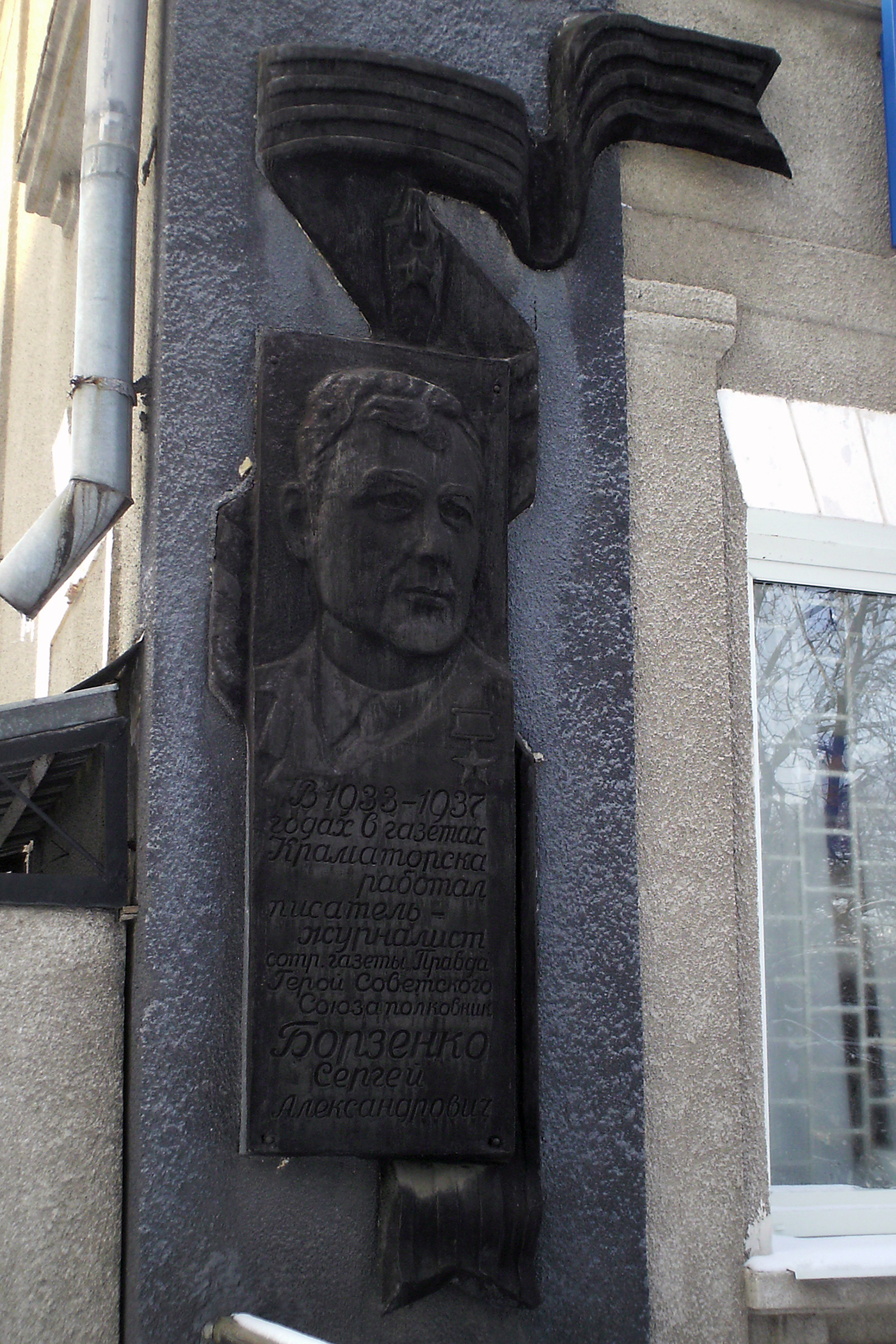 Будинок, у якому працював Борзенко Сергій Олександрііч. журналіст, Герой Радянського Союзу, Краматорськ, вул. Академічна (Шкадінова), 38